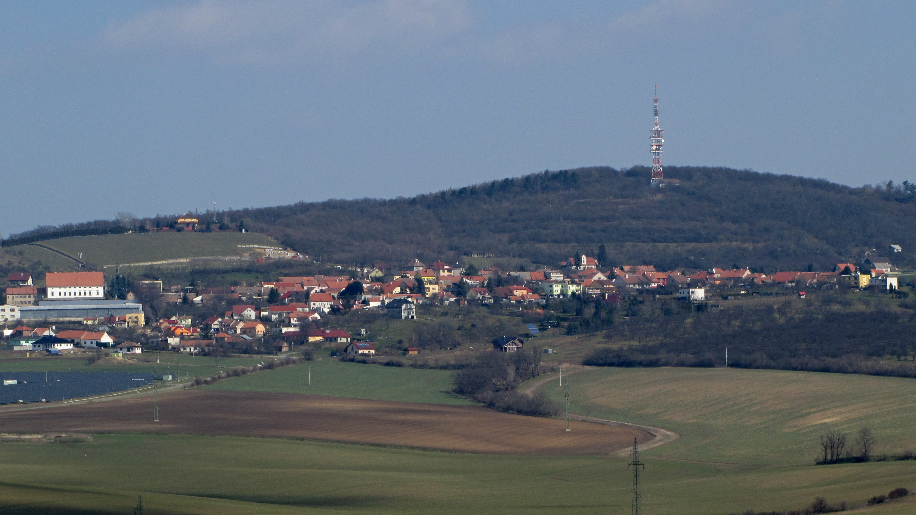 Pohled na Strážovice a Babí lom z polí od Šardic